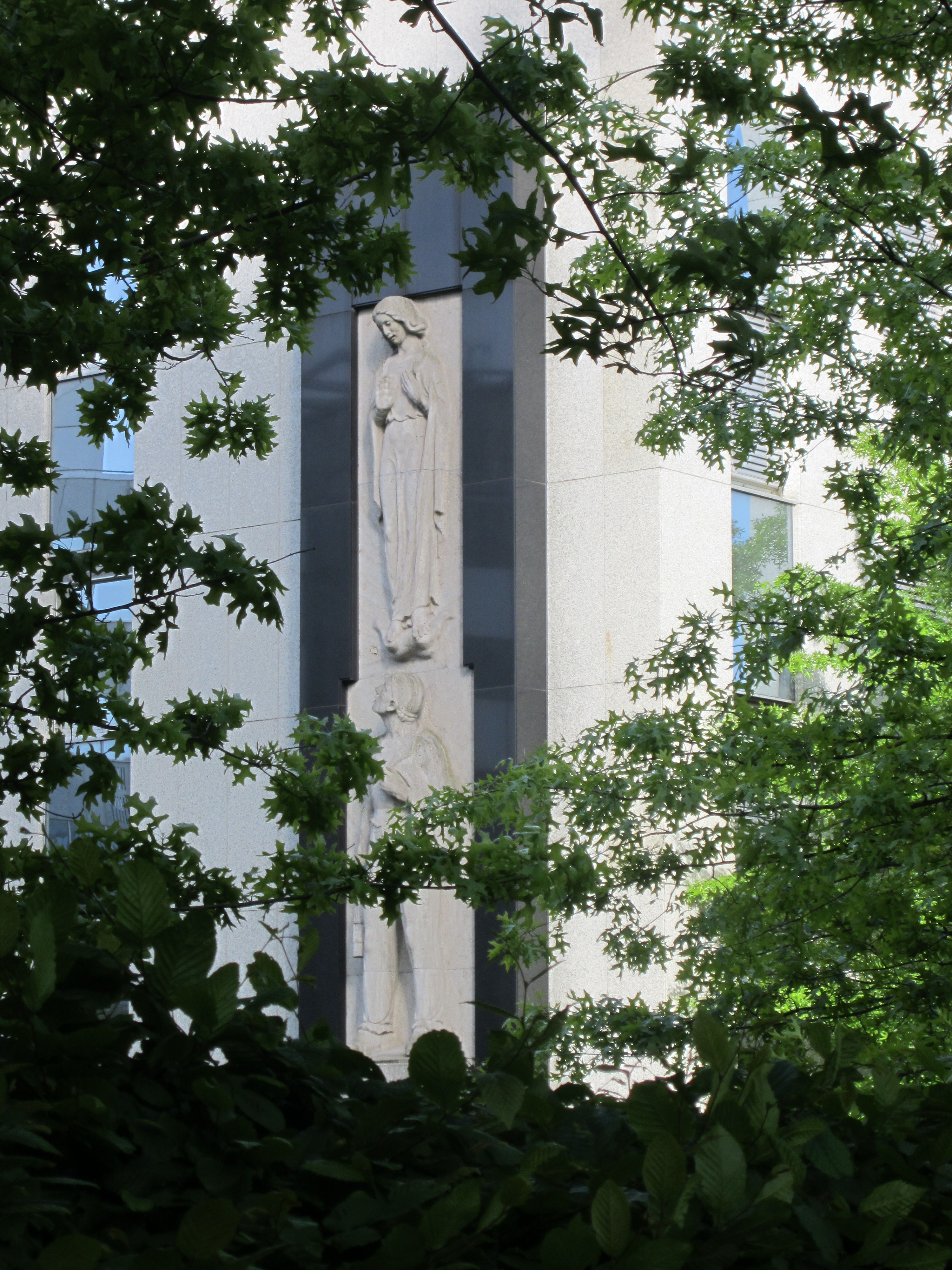 Relief der heiligen Barbara und eines Bergmanns an der Evonok-Zentrale (früher am Ruhrkohlehaus), von der Gärtnerstraße aus gesehen; 1953 von Joseph Enseling erschaffen